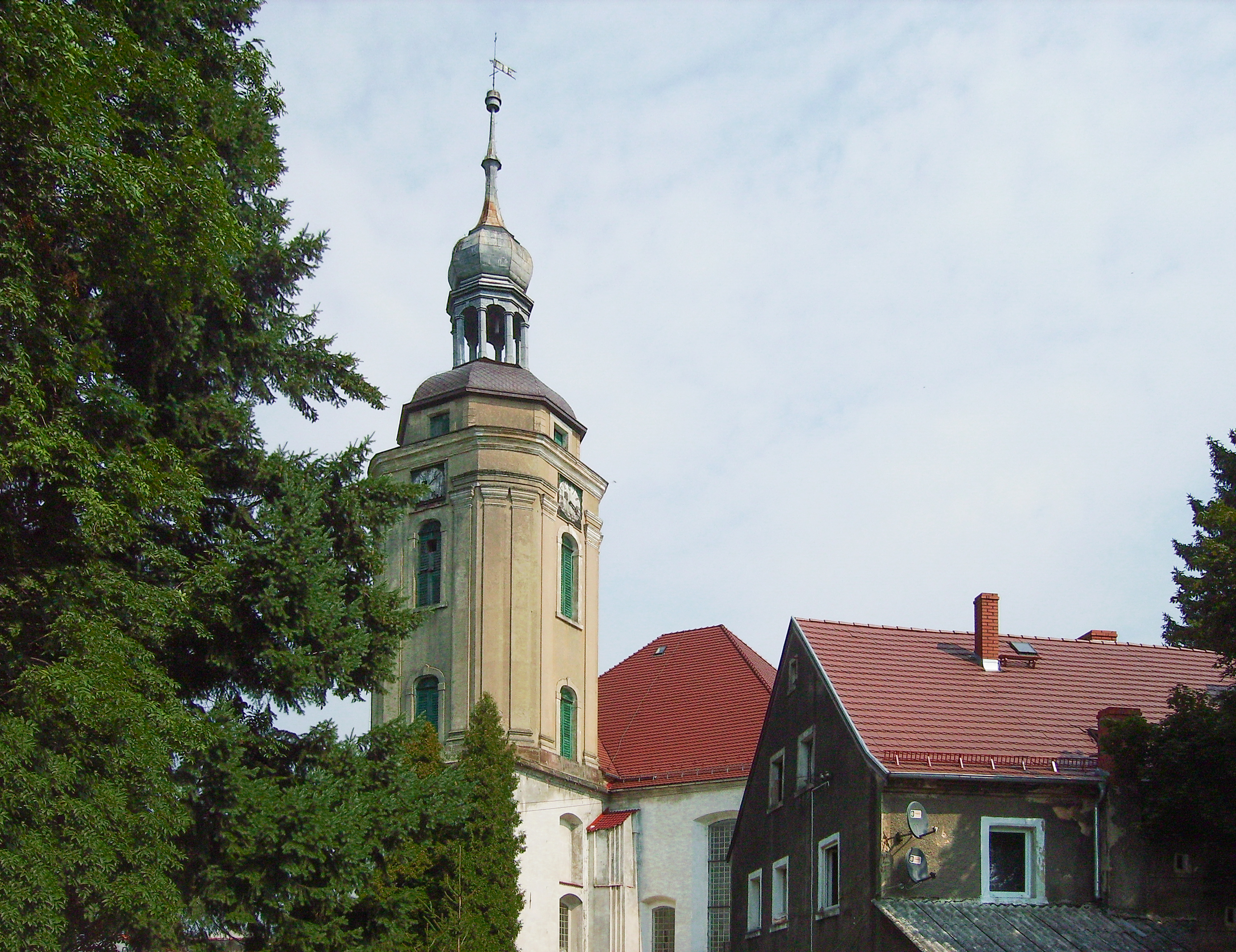 Leśna, kościół ewangelicki, ob. rzym.-kat. pomocniczy p.w. Chrystusa Króla, kon. XVI, 1685, 1703-1719